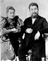 Н.Ф. Катанов с невестой А.И. Тихоновой